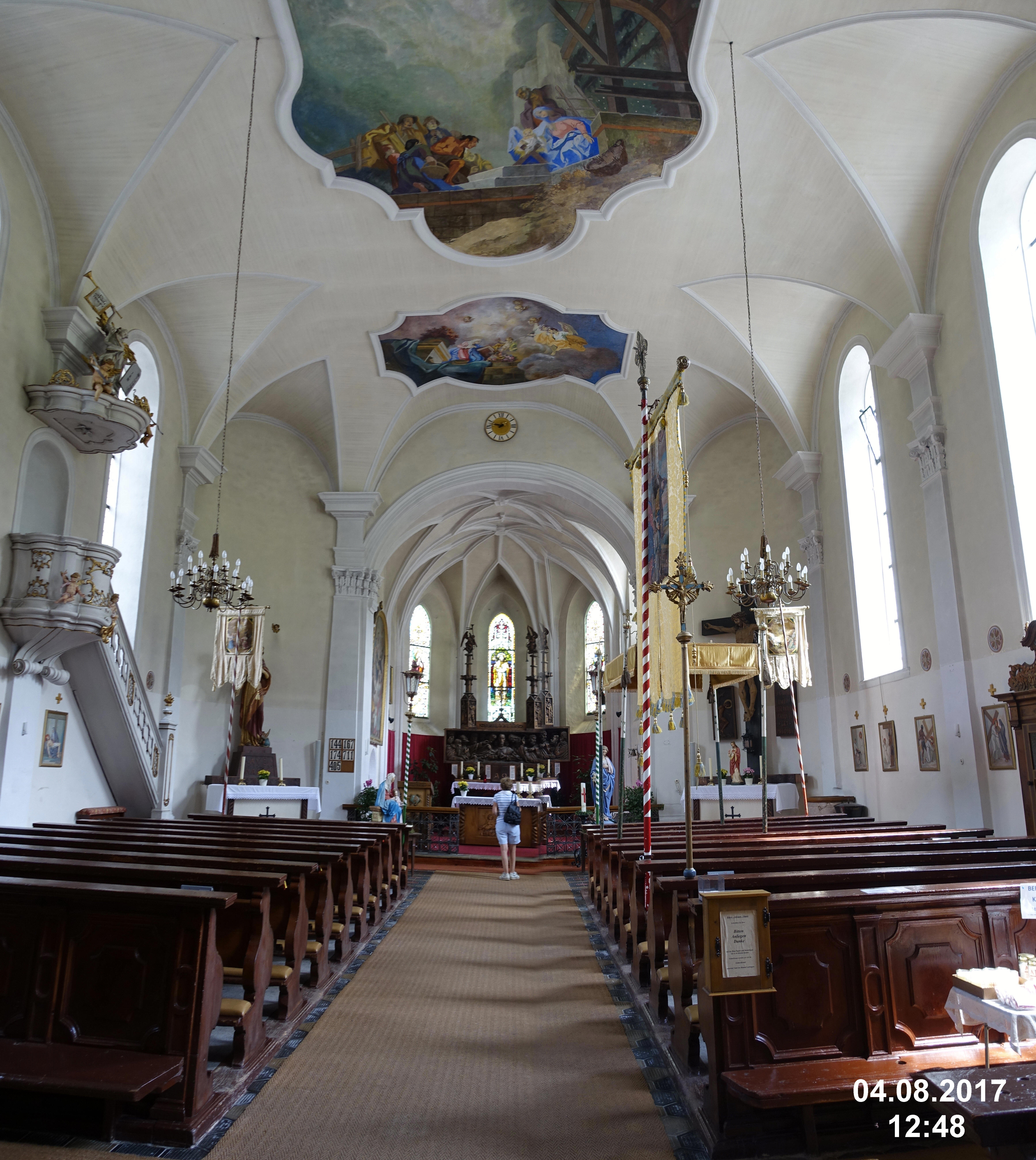 St James parish church, Berwang